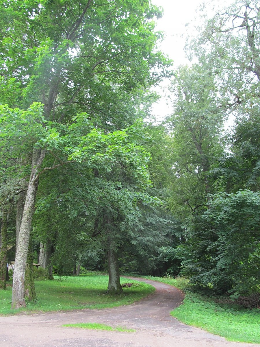 Забалоцце (Перабродскі сельсавет). Сядзіба Дмахоўскіх